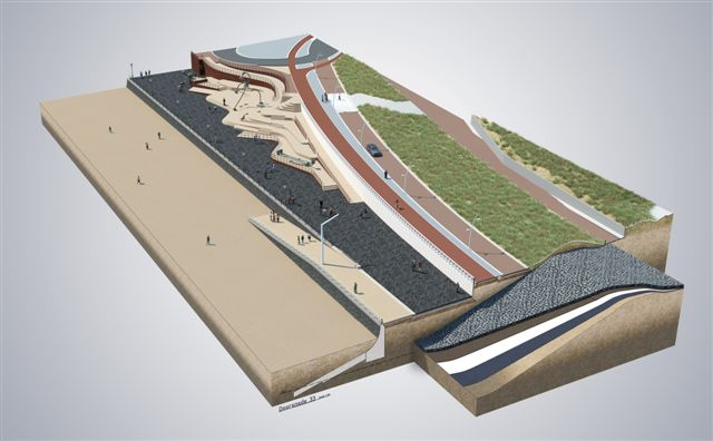 Onder de nieuwe boulevard Scheveningen is de dijk gebouwd